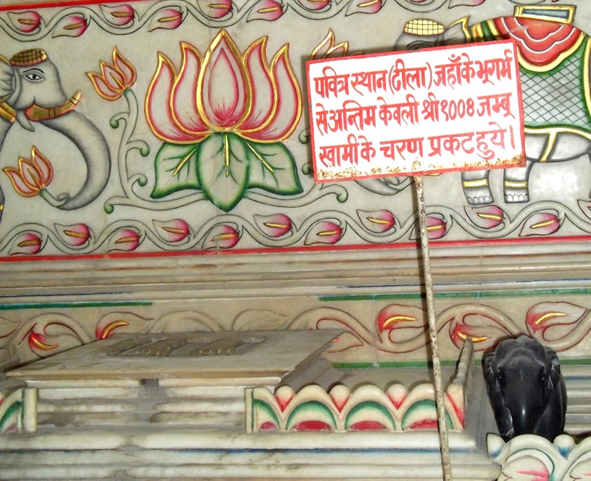 जम्बूस्वामी जी के चरण (मथुरा)